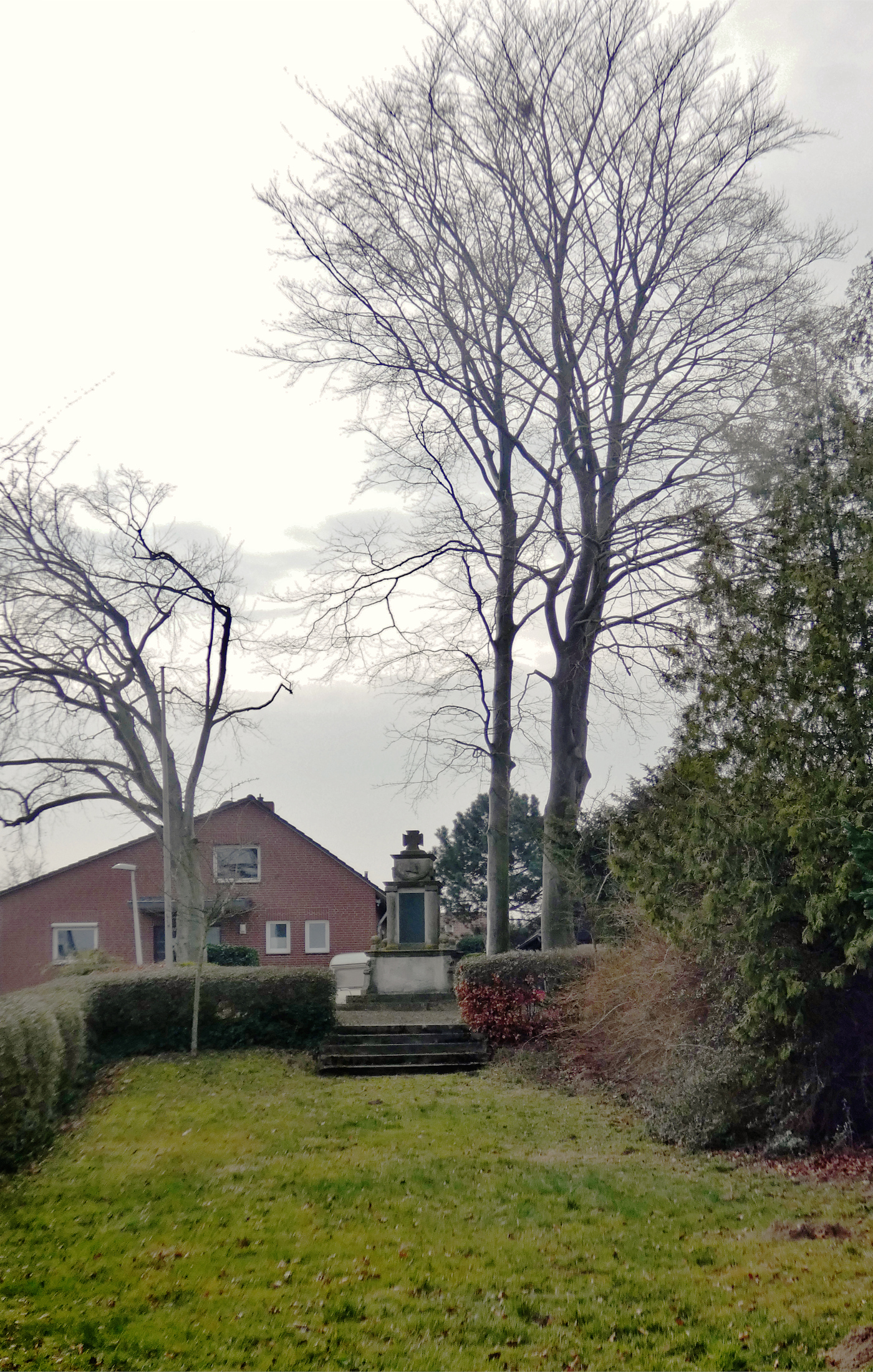 Ehrenmal und Anlage für Northens Weltkriegsgefallene.